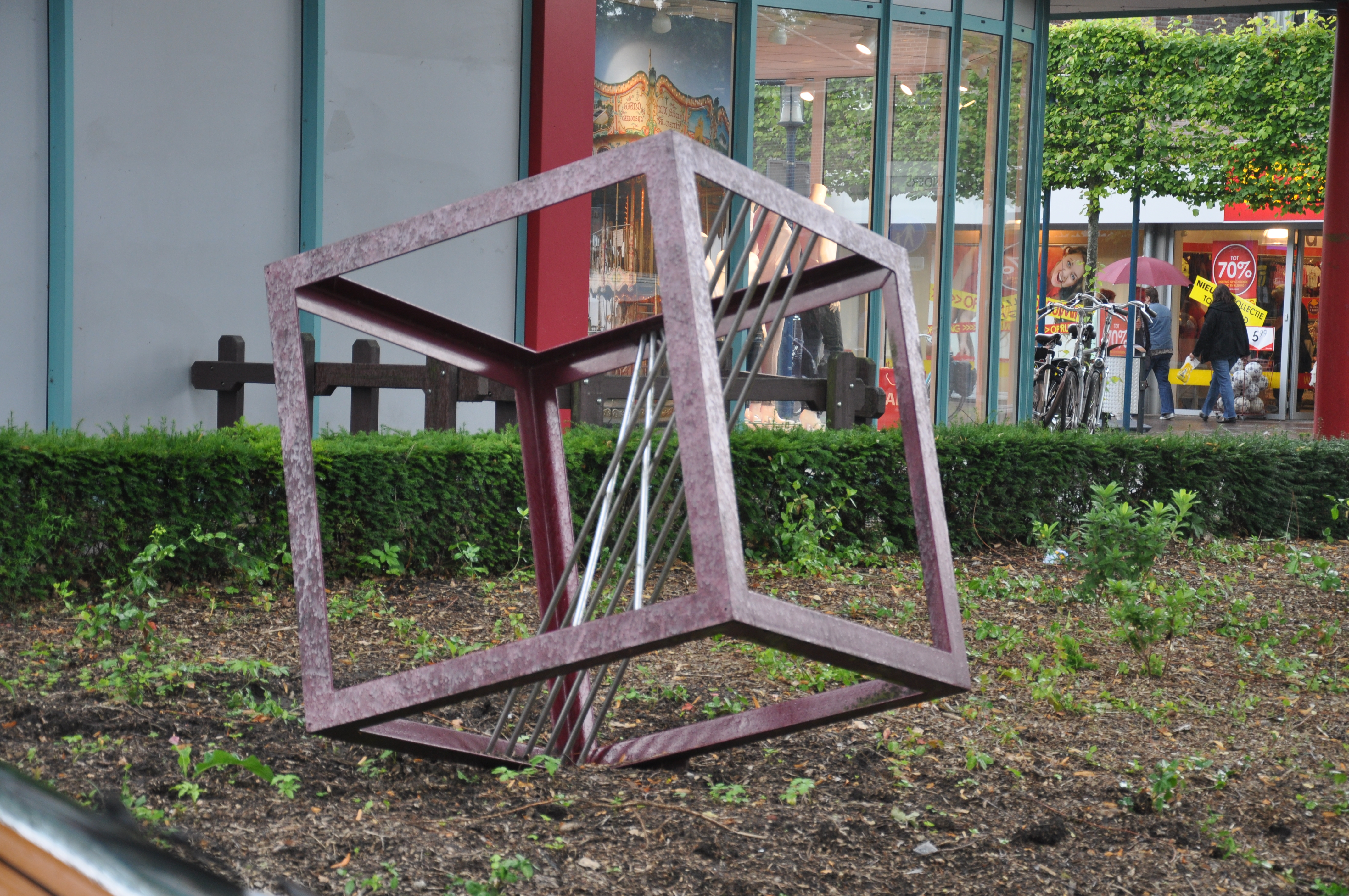 Martha Waijop, Emmastraat Epe 1994